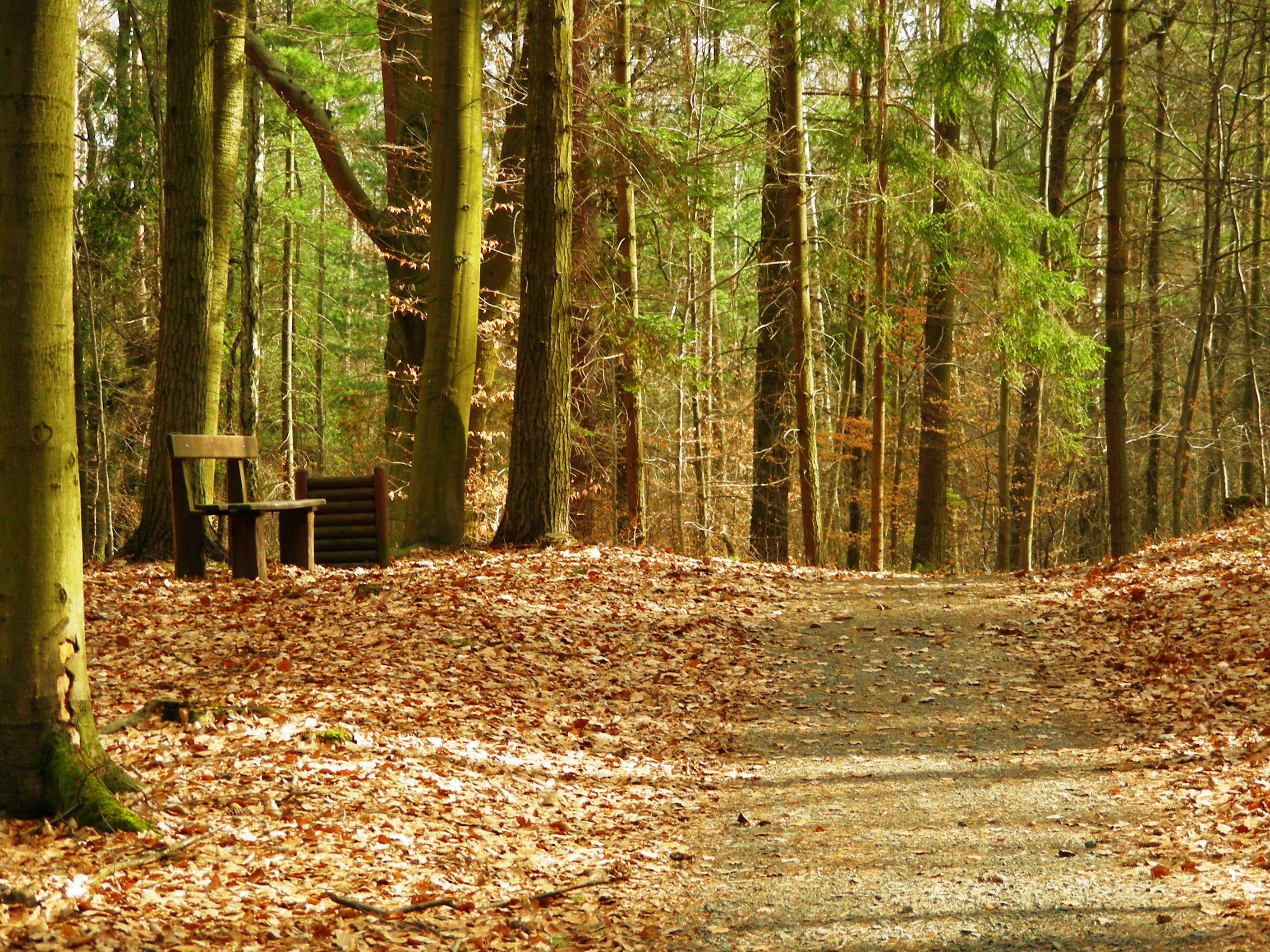 Alejka w parku, Zespół Przyrodniczo-Krajobrazowy Lipno, gmina Niemodlin, województwo Opolskie, Polska